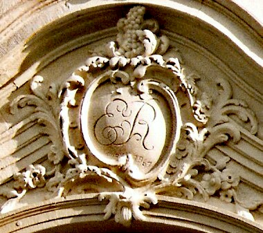 Das Robert’sches Haus, Portalkartusche